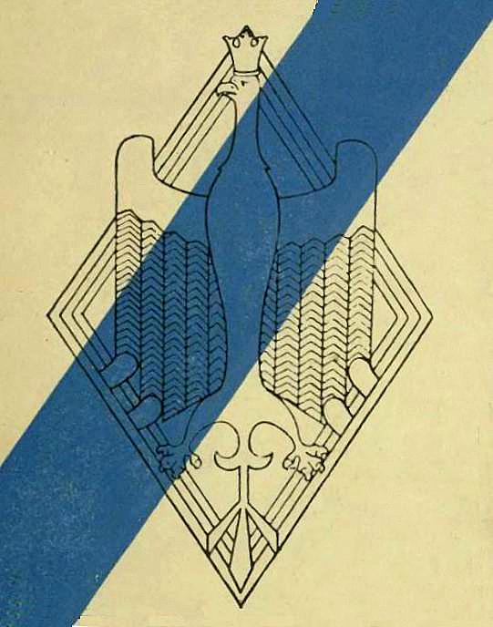 Emblemat Związku Hallerczyków